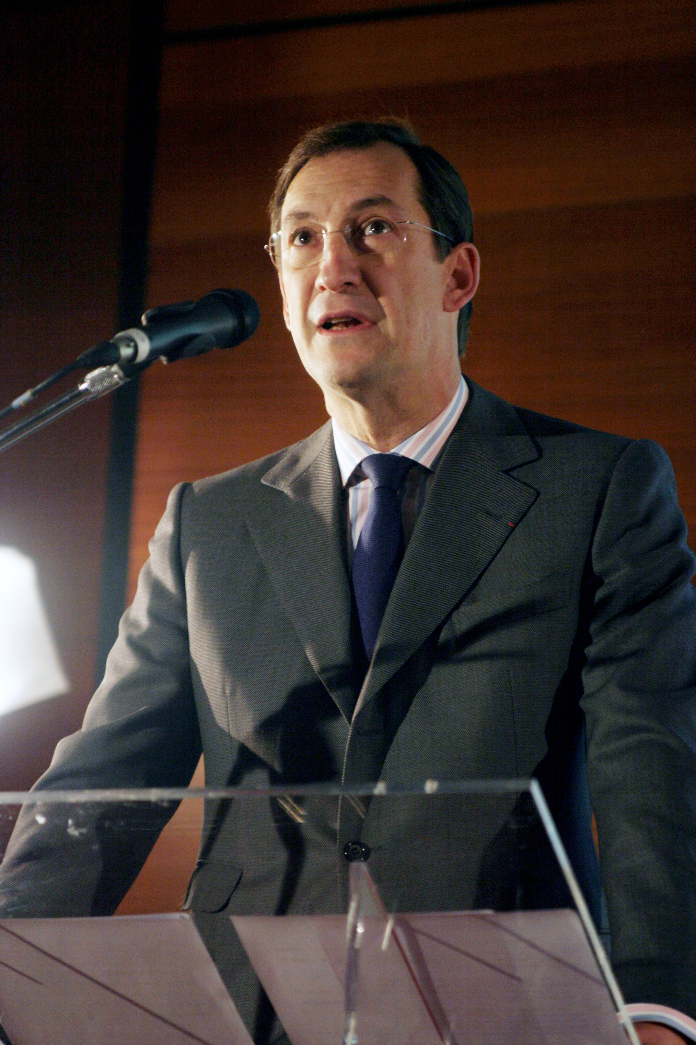 Nicolas Bazire le 4 novembre 2009 lors du colloque international "Sortir du communisme, changer d'époque" organisé par Fondapol en partenariat avec la Fondation Robert-Schuman.